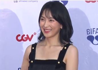 디스패치 구독 클릭! Dispatch Subscribe